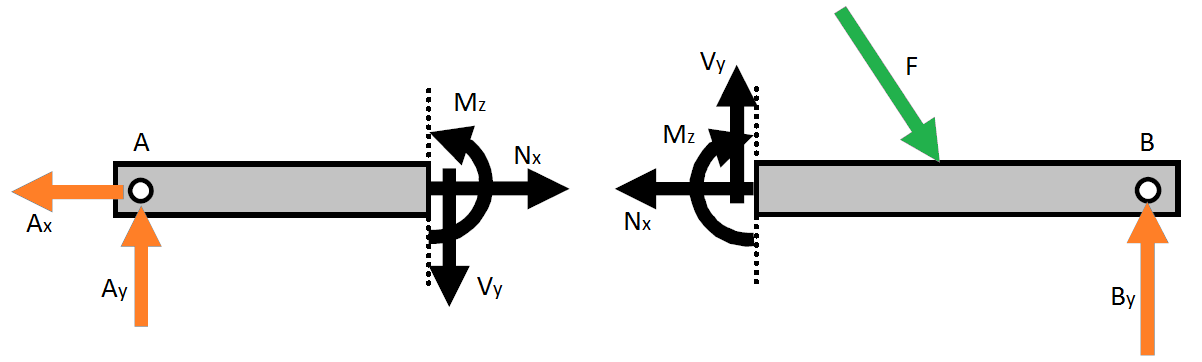 Egoera lau bateko habe batean ebaketa printzipioa aplikatuz agertzen diren barne esfortzuak, non irudiko F habean aplikatutako indarra den, Ax, Ay eta By lotura erreakzioak diren, Nx, Vy eta Mz barne esfortzuak diren.